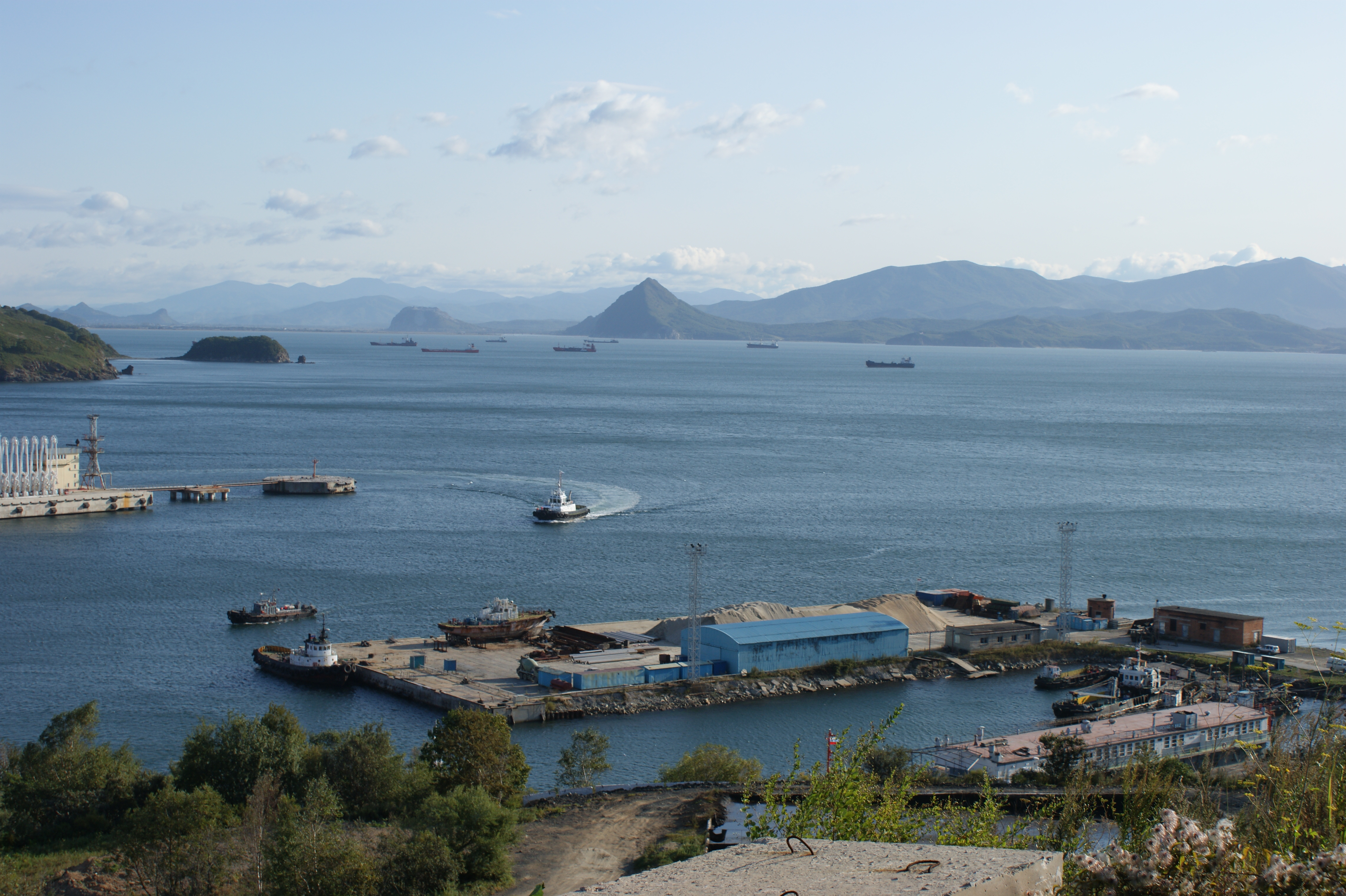 Nakhodka Bay in September